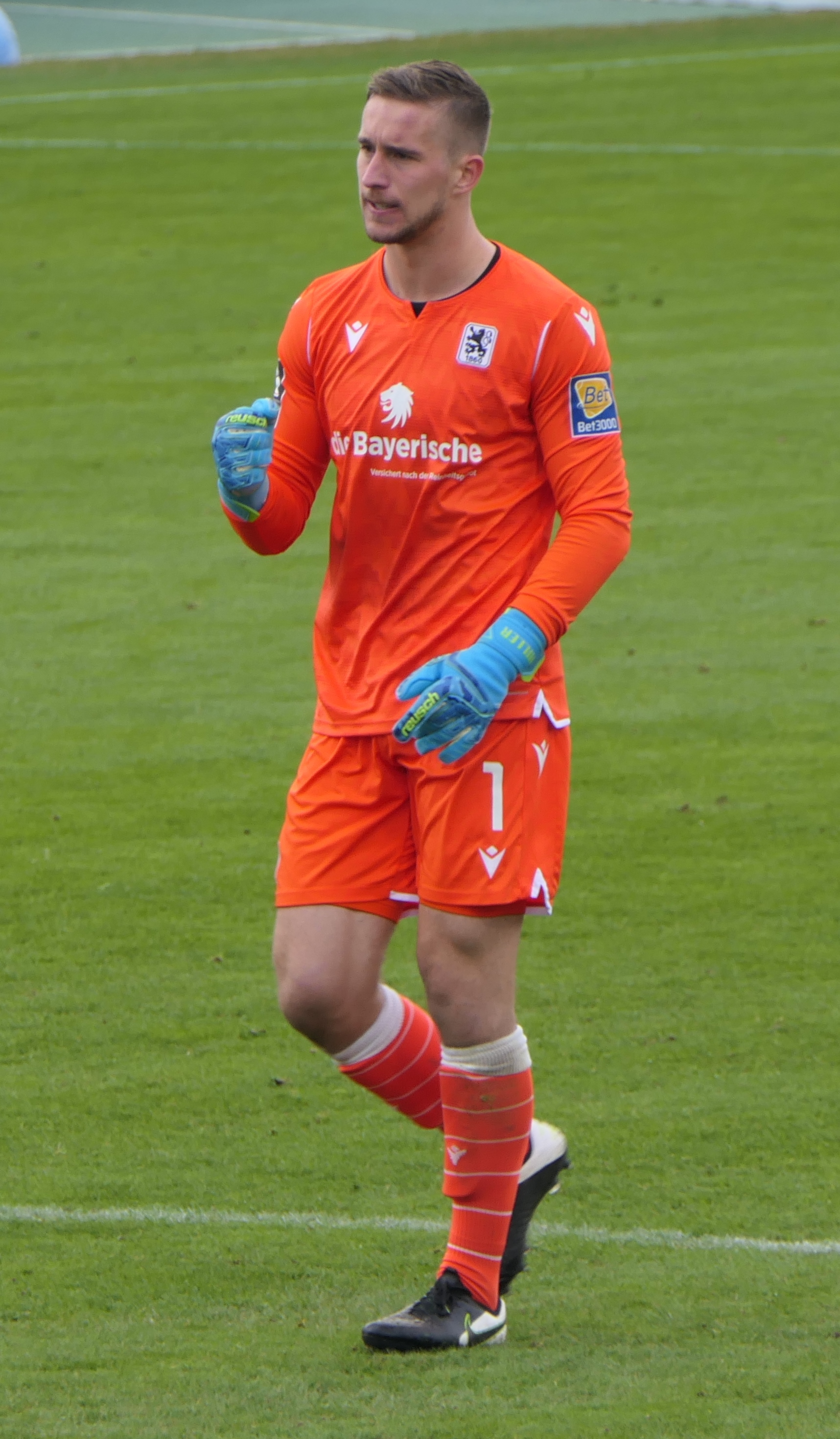 Der Fussballprofi Marco Hiller im Trikot vom TSV 1860 München beim Heimspiel gegen Eintracht Braunschweig am 26.01.2020.